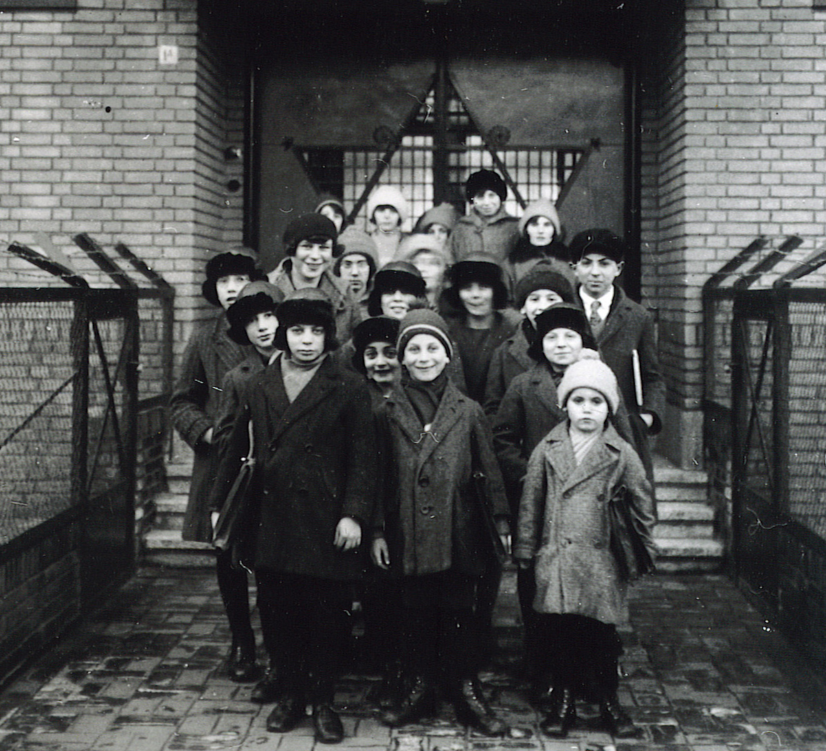 Bewoners van het weeshuis in 1938